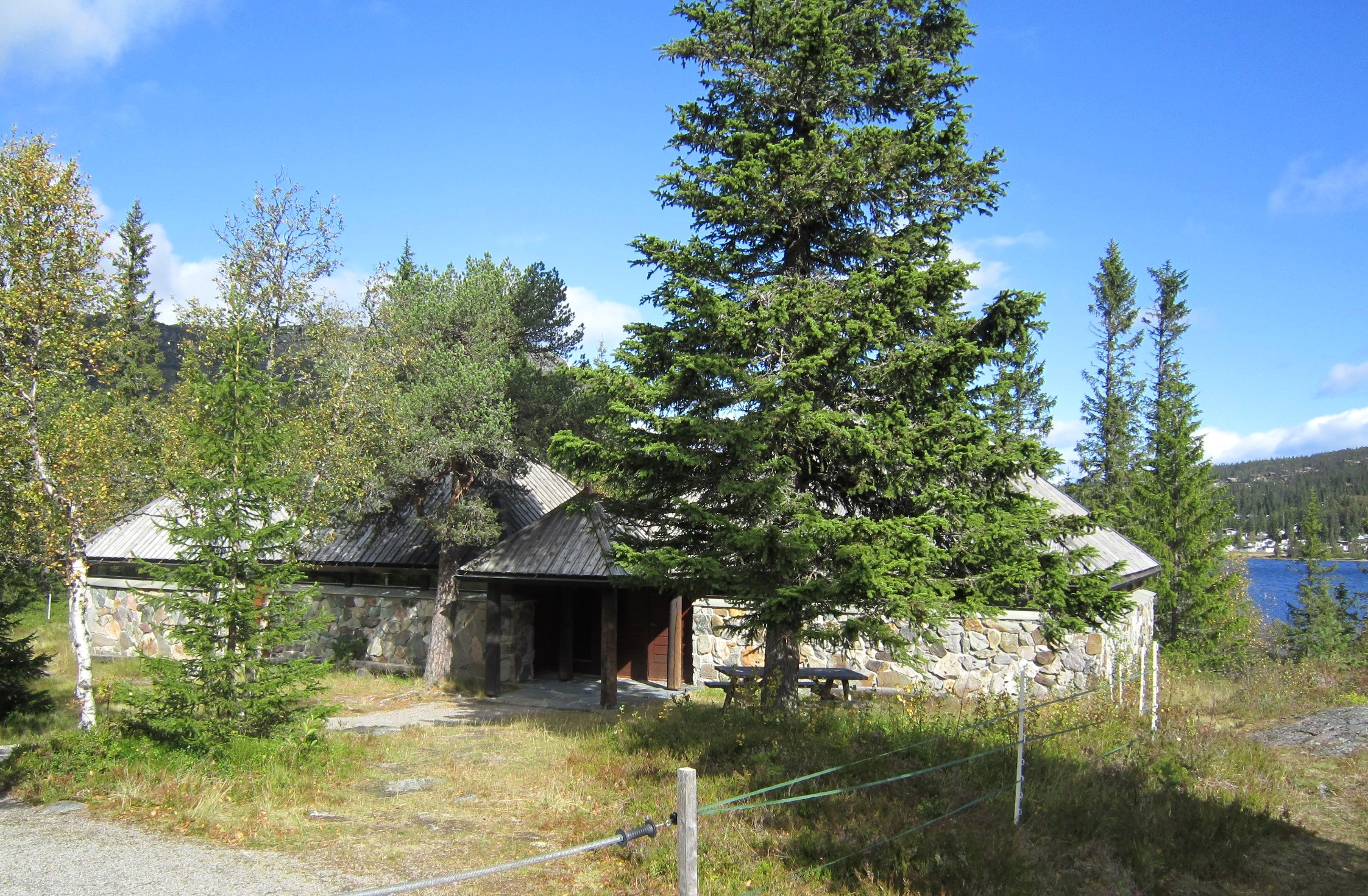 Haglebu fjellkirke (Sigdal kommune)